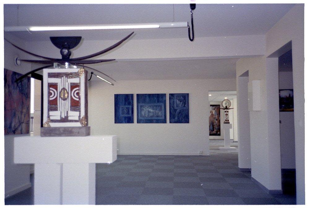 Exposition de peinture Art et Rêve avec Roger Zanoni, J.M.Sordello (photographies), et Stan (sculptures).